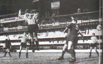 Gol de Marcos Conigliaro en la primera final de la Intercontinental '68, donde Estudiantes de La Plata derrotó a Manchester United por 1-0.